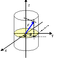 Цилиндричне координате